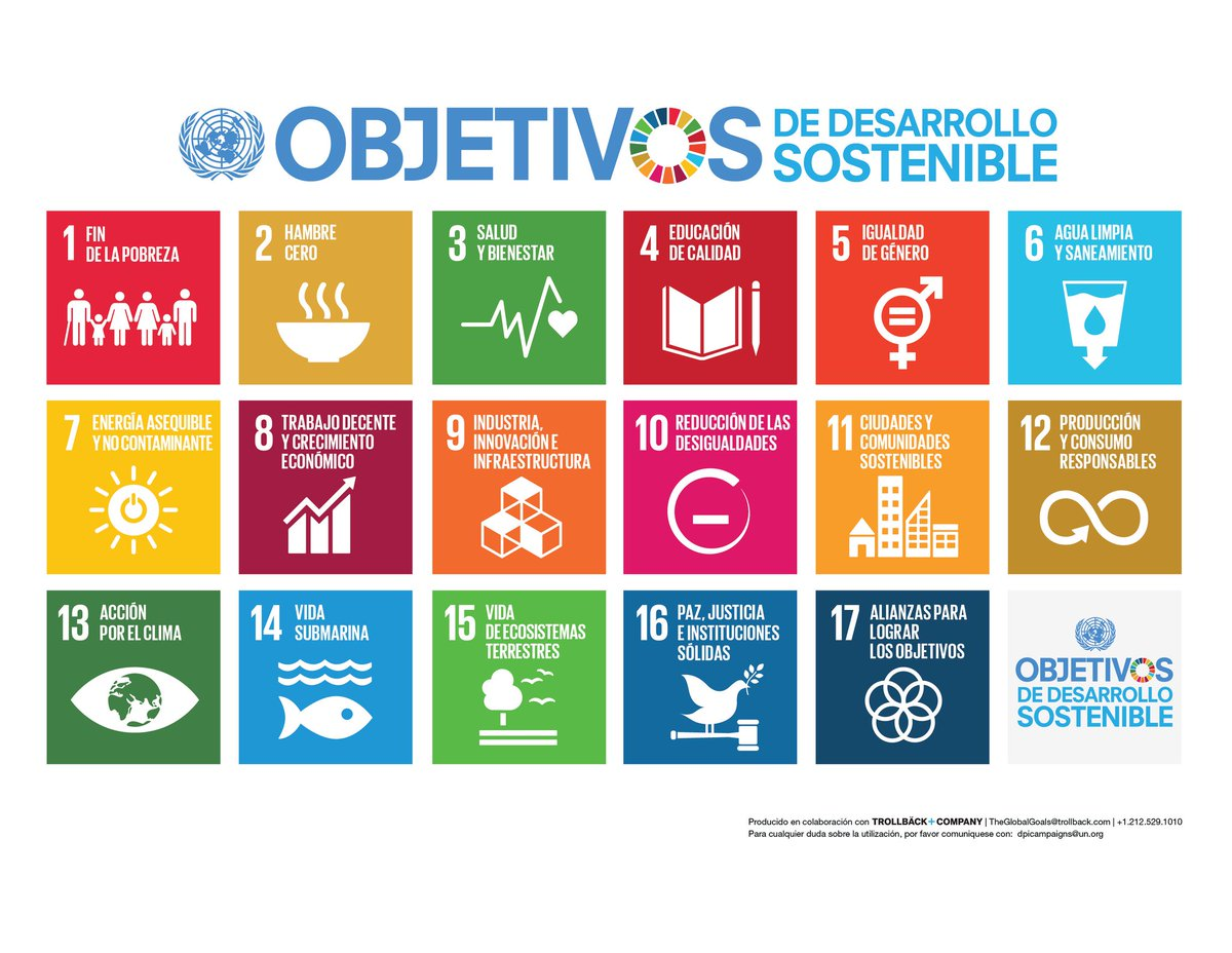 Logo de las Naciones Unidas para el desarrollo sostenible